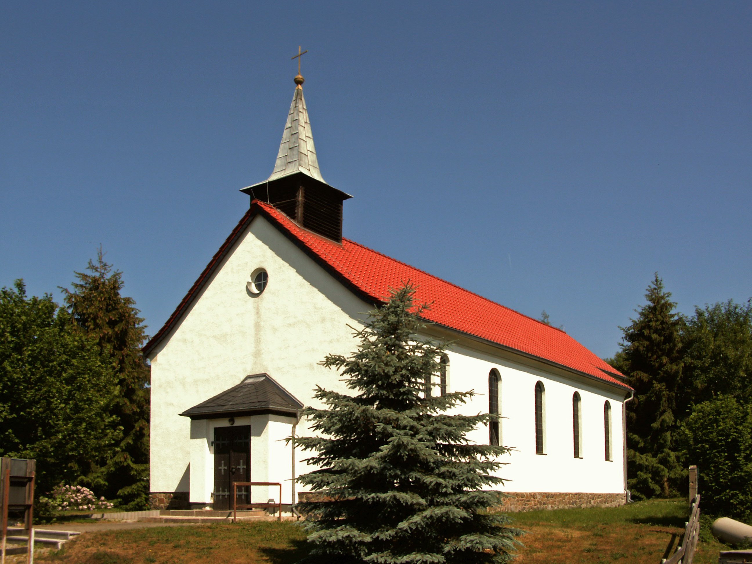 Katholische Kirche St. Johannes Baptist in Harzgerode, Landkreis Harz